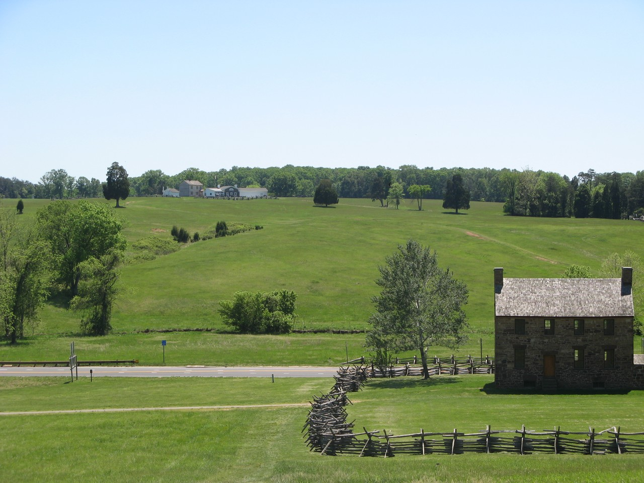 05.05.10 Bull Run 060 [1280x1024]